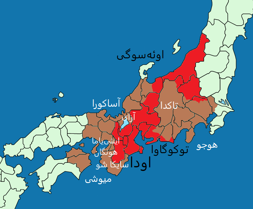 map of Sengoku period 1572